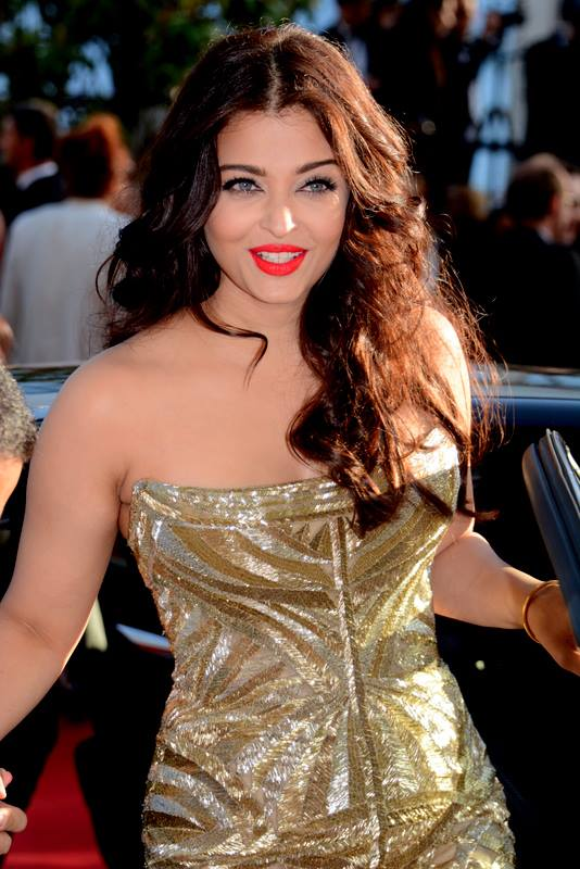 Aiswharya Rai au festival de Cannes